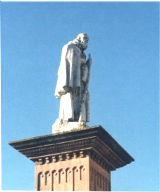 Statua di Sant'Ignazio nella piazza di Laconi, Sardegna